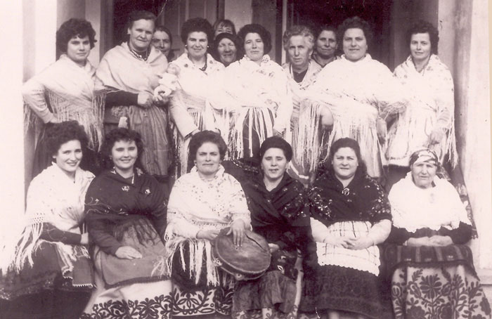 Coreses (Zamora) - Santa Águeda / 6 Feb. 1966 - Fotografía 205 x 135 B/N